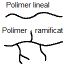 Confirmo que el gráfico fue creado para Wikipedia, a la que cedo todos los derechos. Untrozo 12:19 15 may, 2005 (CEST)